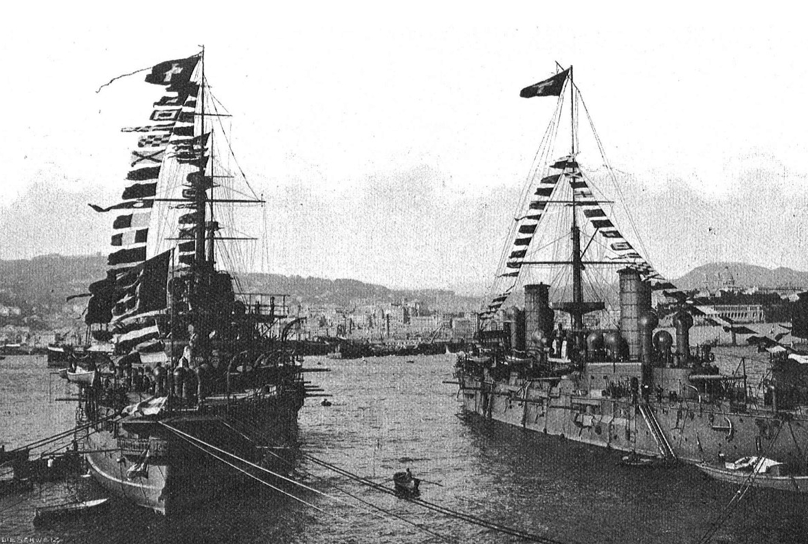 Simplon Feierlichkeiten 1906, Flottenparade bestehend aus sechs Hochseetorpedobooten, sechs Torpedojägern, vier Panzerkreuzer und Panzerschiffe zu Ehren der Schweizer Gäste im Hafen vor Genua. Links, Schweizer Schiff Regina Margherita. Rechts, das Rechts, das Panzerschiff Benedetto Brin